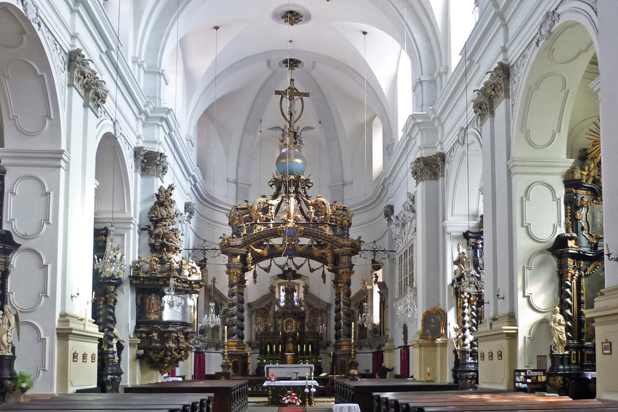 Innenraum der Basilika in Mariaschein (Bohosudov)